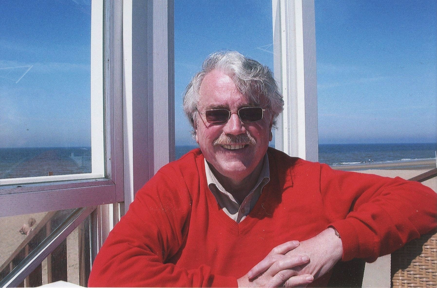 Wikipedia Foto Wolf Stegemann